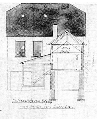 Plan für den Umbau der Synagoge in Grötzingen (Karlsruhe) von 1898/99